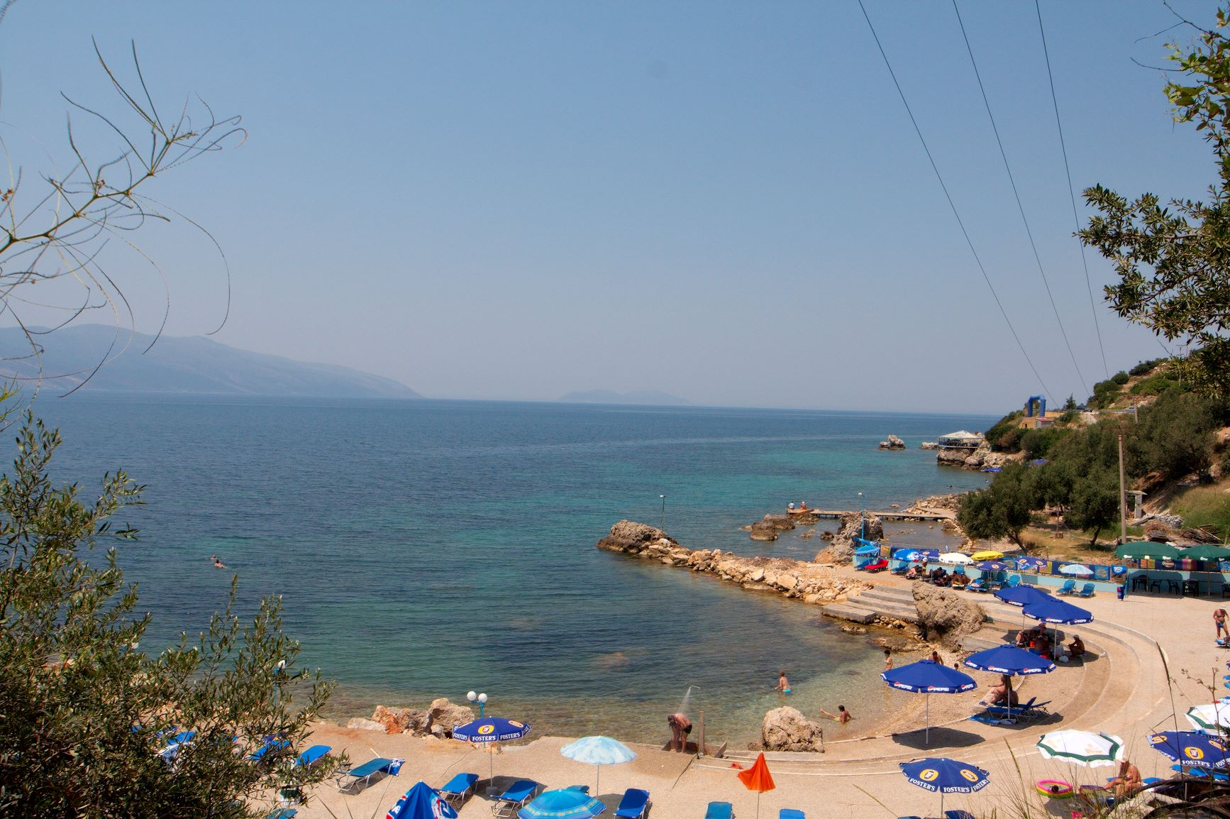 Taken in Vlora, Albania